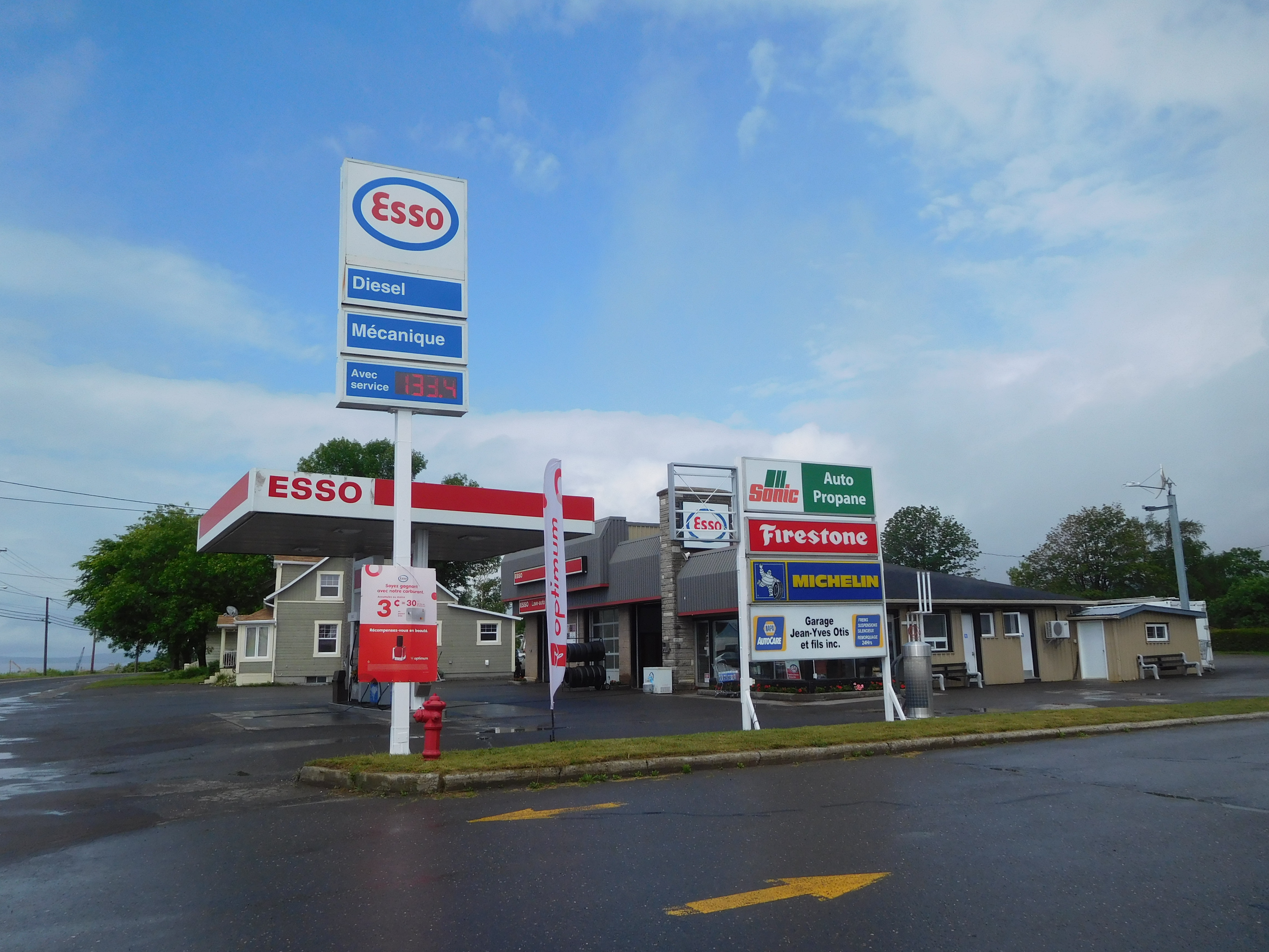 Station Esso, 668, boulevard Perron, Carleton-sur-Mer